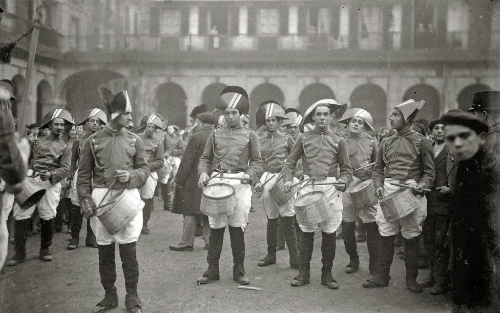 Título original: Tamborrada de San Sebastián (5/93) Localización: San Sebastián (Guipúzcoa)